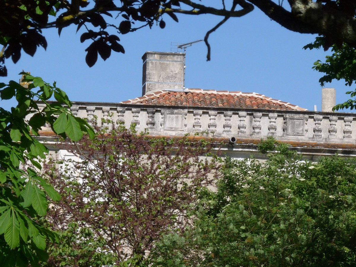 Château d'Ardenne, Charente, France